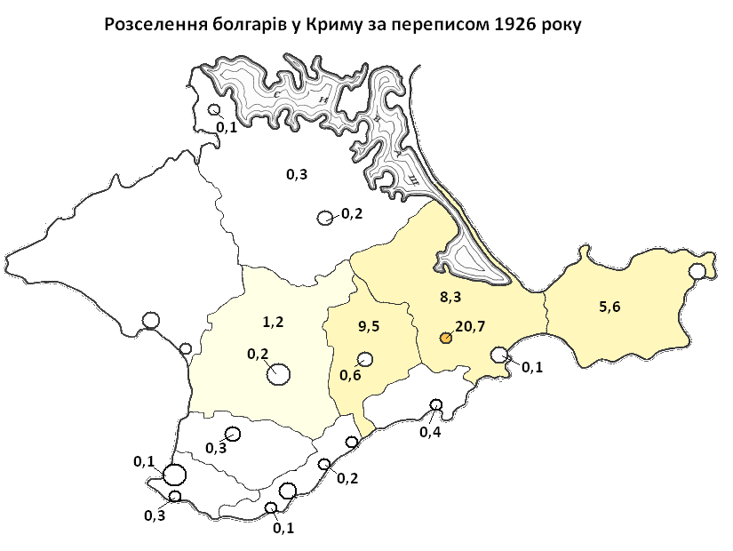 Частка болгарів у населенні Криму за даними перепису населення 1926 року